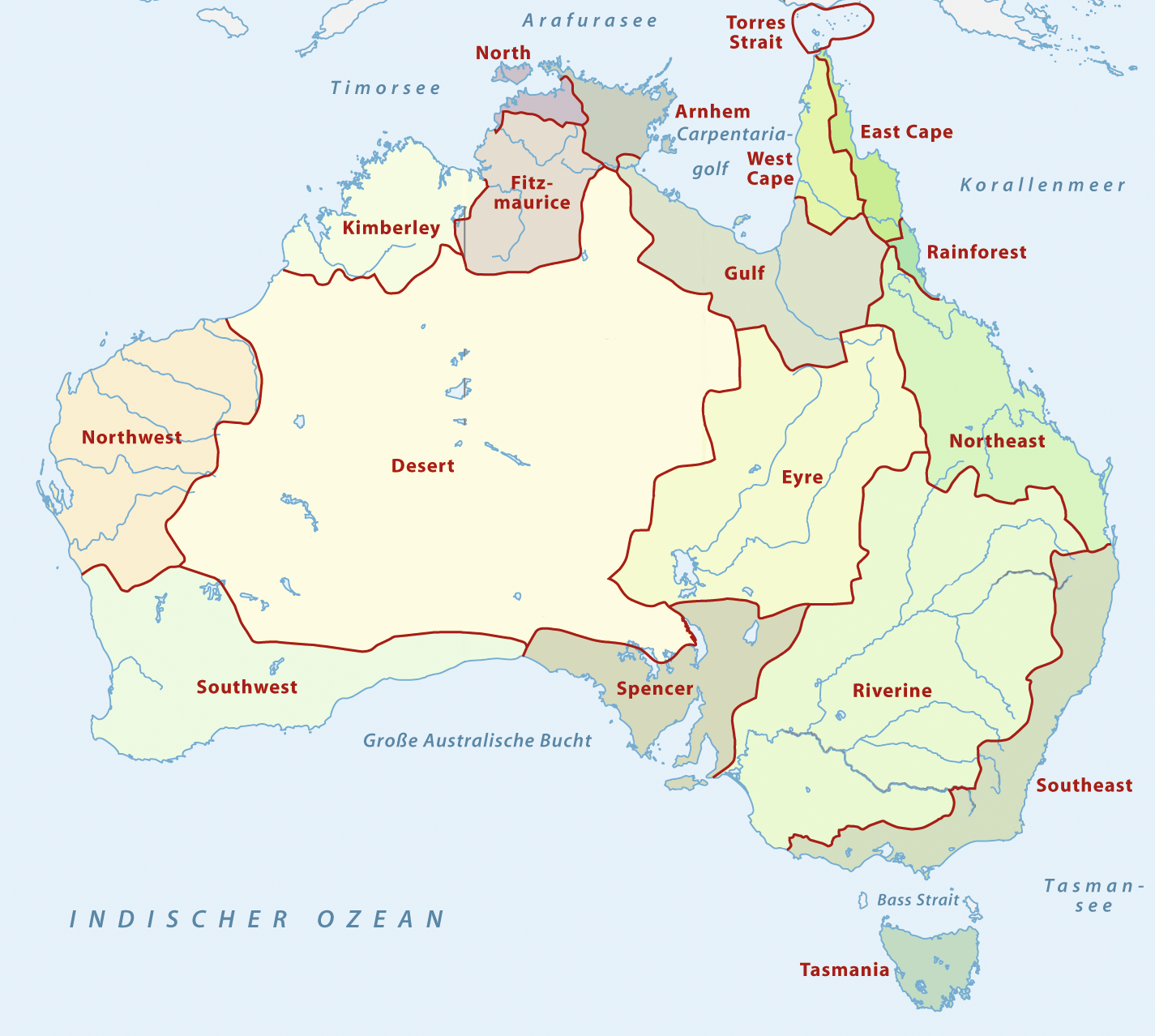 Karte der Aborigines-Regionen Australiens